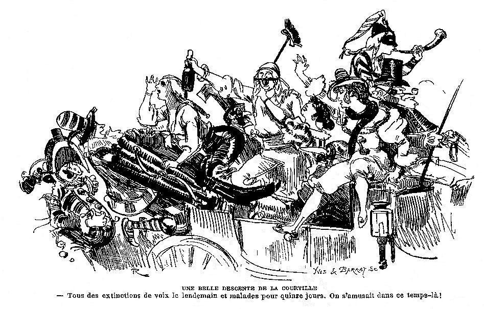 Évocation de la Descente de la Courtille (célèbre parade carnavalesque parisienne apparue en 1822 et disparue vers 1860).